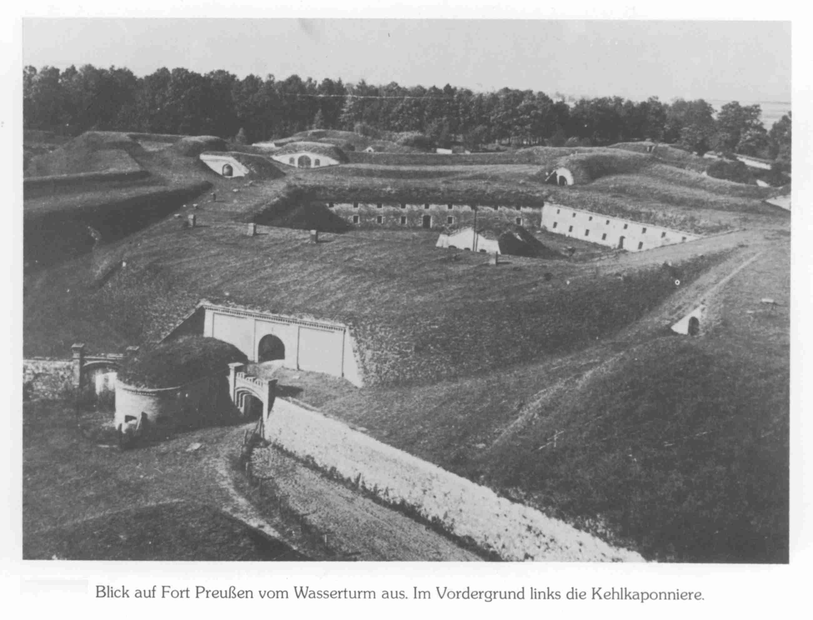 Fort Prusy - Twierdza Nysa